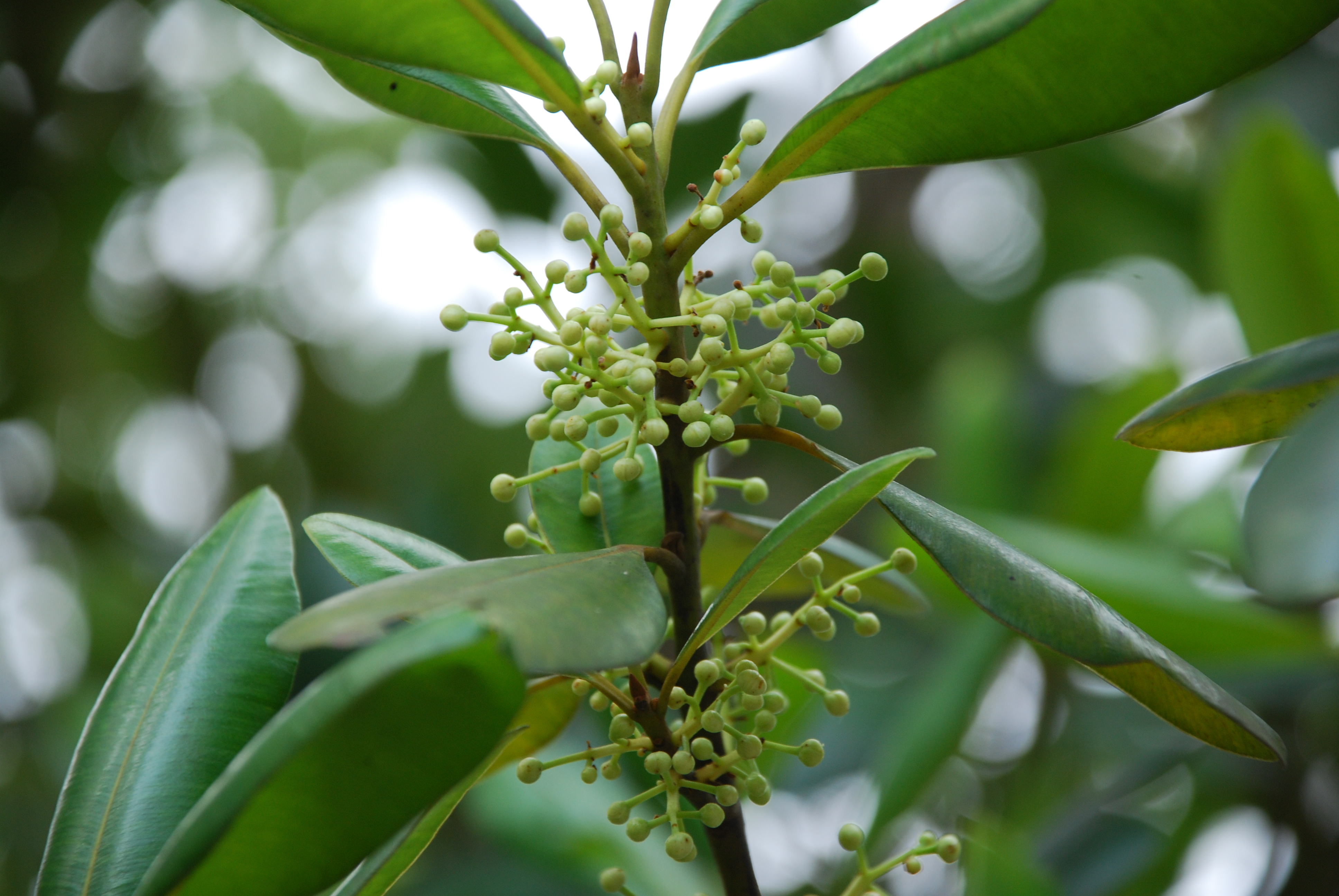 flores de guanandi